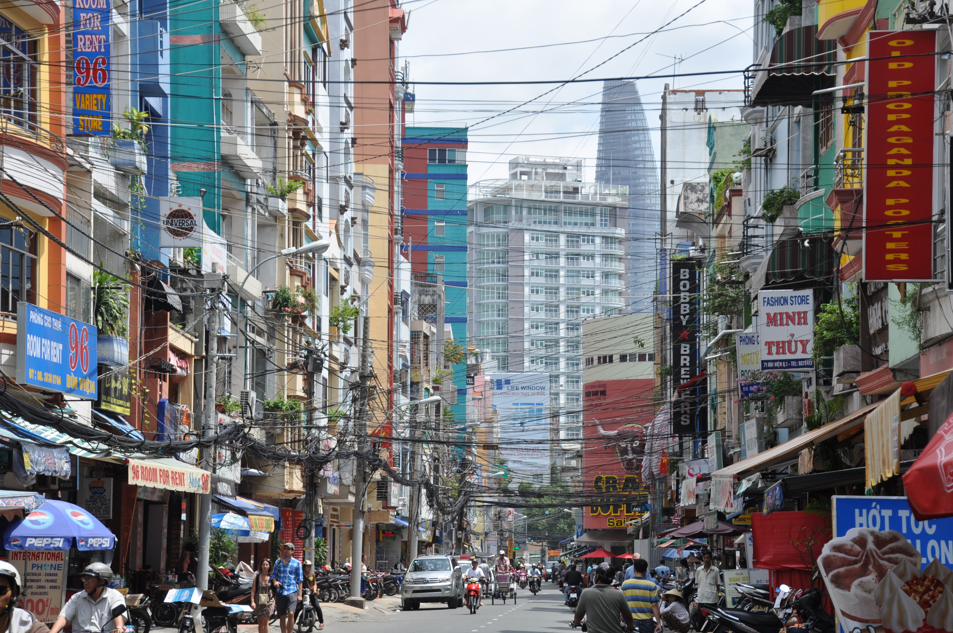 Khu Tay balo, Duong Bui Vien,Phuong Ng Thai Binh, q1, hcm,photo by Dyt